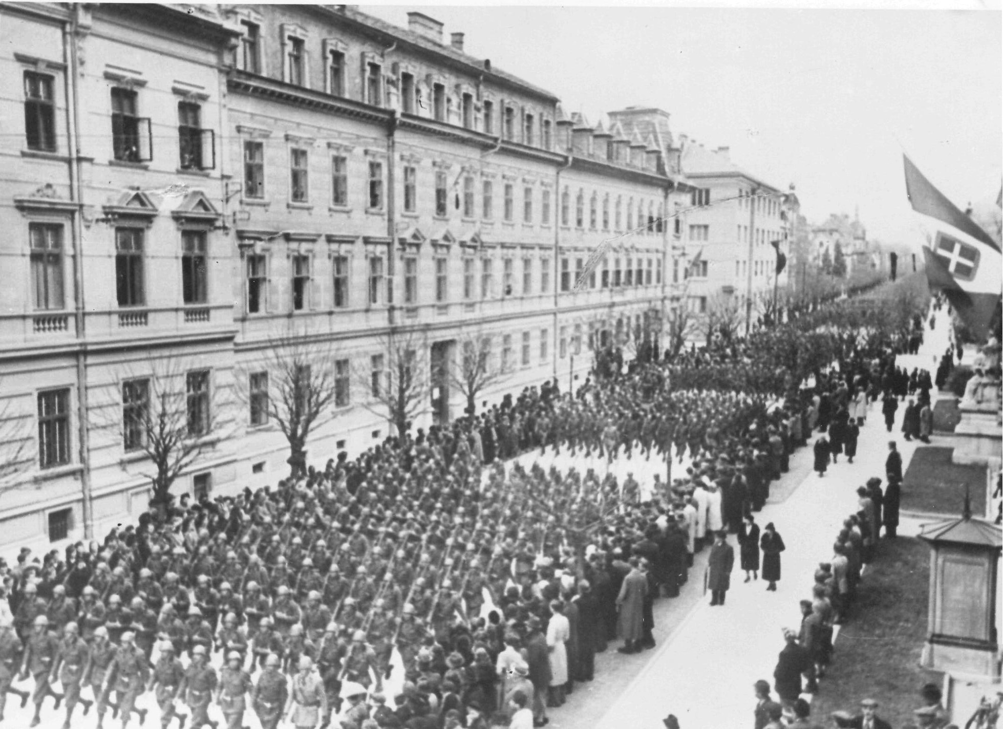 Parada karabinjerov v Ljubljani.